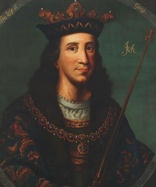 Le roi Jean de Danemark